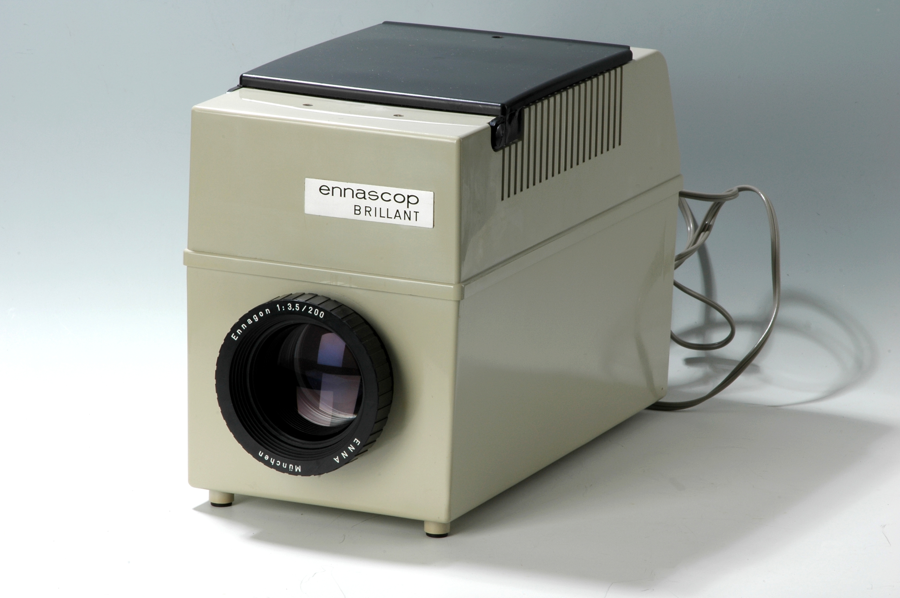 Episkop der Firma "Enna München"